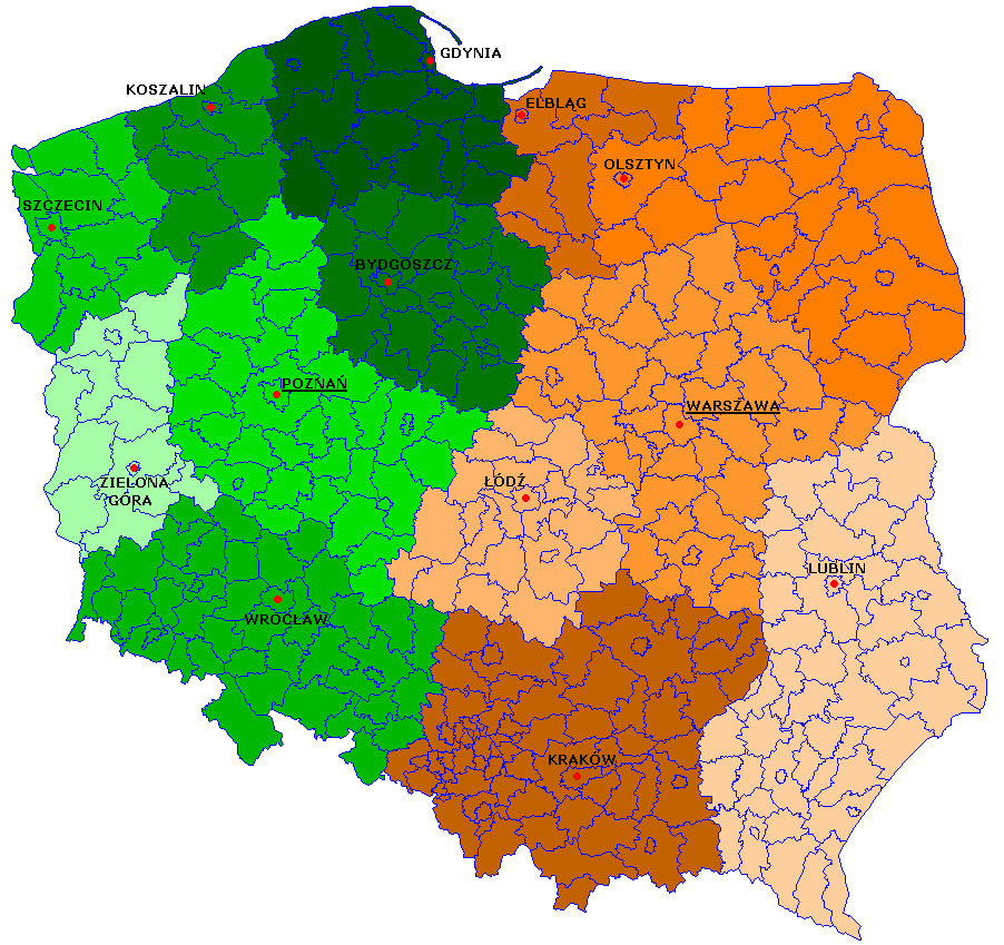 Wojskowe prokuratury garnizonowe w Polsce. Na zielono zaznaczono prokuratury garnizonowe podległe Wojskowej Prokuraturze Okręgowej w Poznaniu. Na pomarańczowo - podległe Wojskowej Prokuraturze Okręgowej w Warszawie. Stan na 16 listopada 2007 - rozporządzenie Ministra Obrony Narodowej z dnia 15 grudnia 1998 r. w sprawie tworzenia, znoszenia oraz ustalania siedzib i terytorialnego zakresu działania wojskowych jednostek organizacyjnych prokuratury (Dz. U. z 1998 r. Nr 159, poz. 1048, z 2002 r. Nr 142, poz. 1192, z 2004 r. Nr 20, poz. 182).